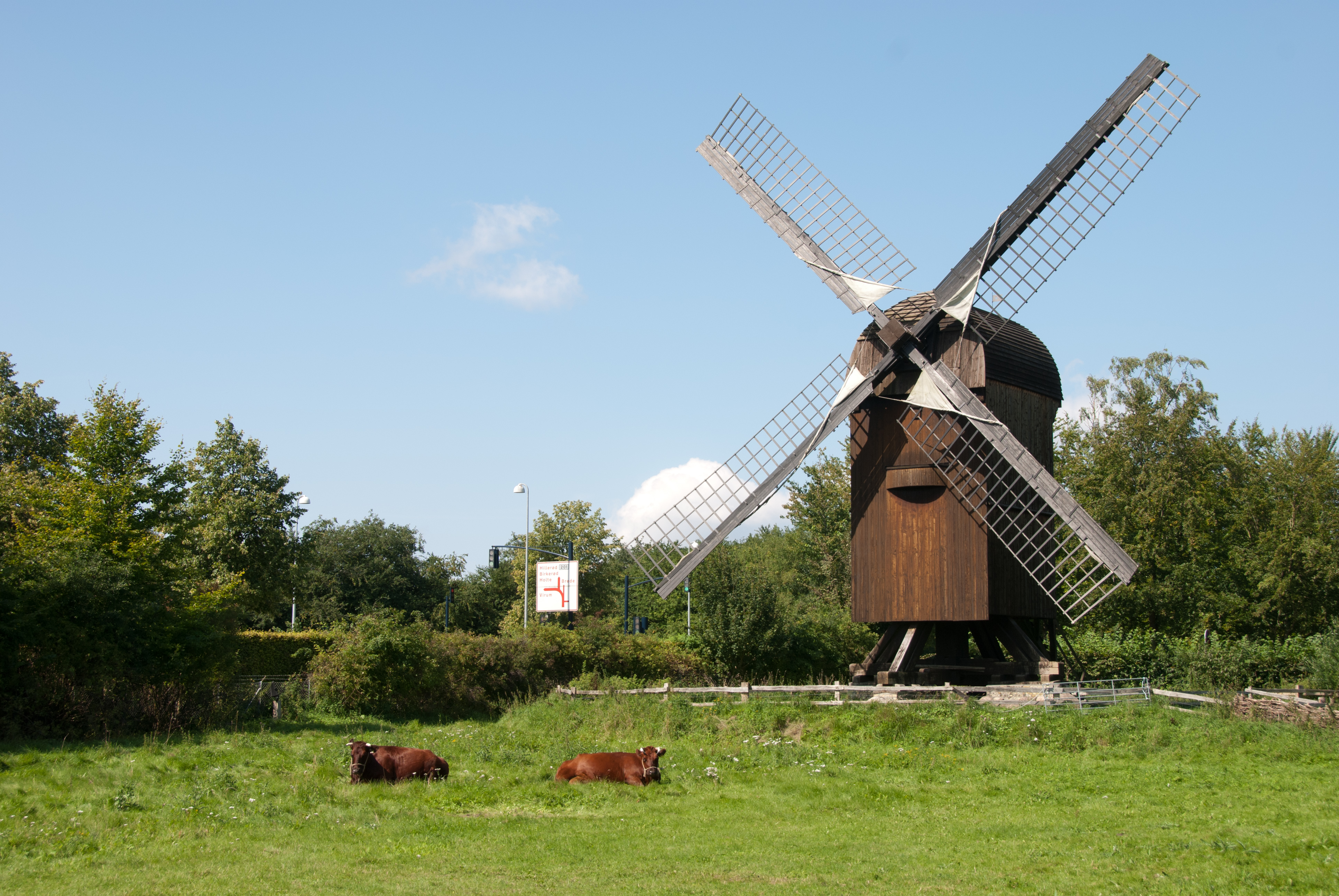 Karlstrup Windmill at Frilandsmuseet in Lyngby, Denmark